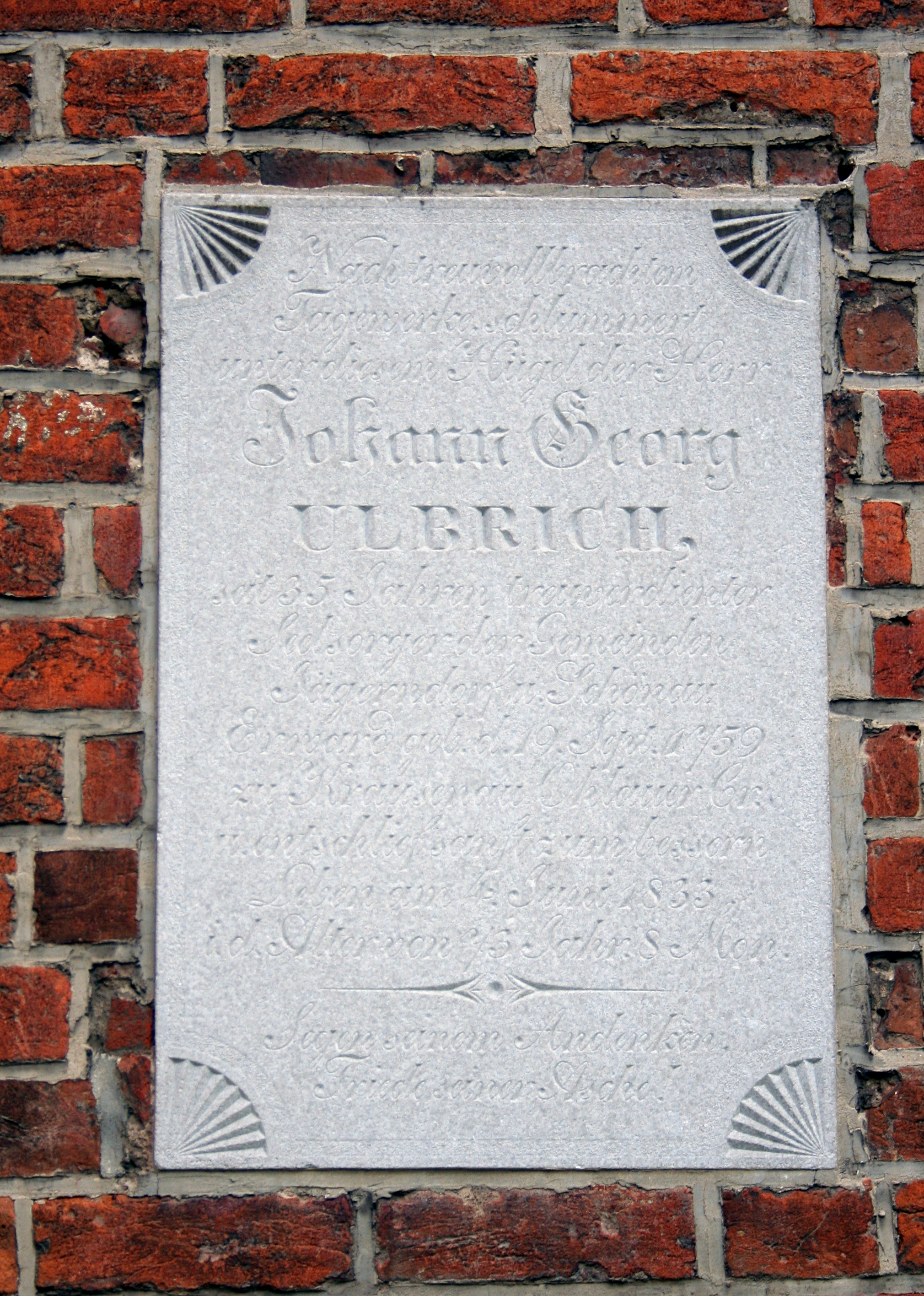 tablica na kościele św. Antoniego w Strzelnikach, woj. opolskie